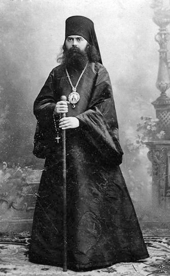 Епископ Дмитровский Трифон (Туркестанов). 1905 г. Из фондов музея Данилова монастыря